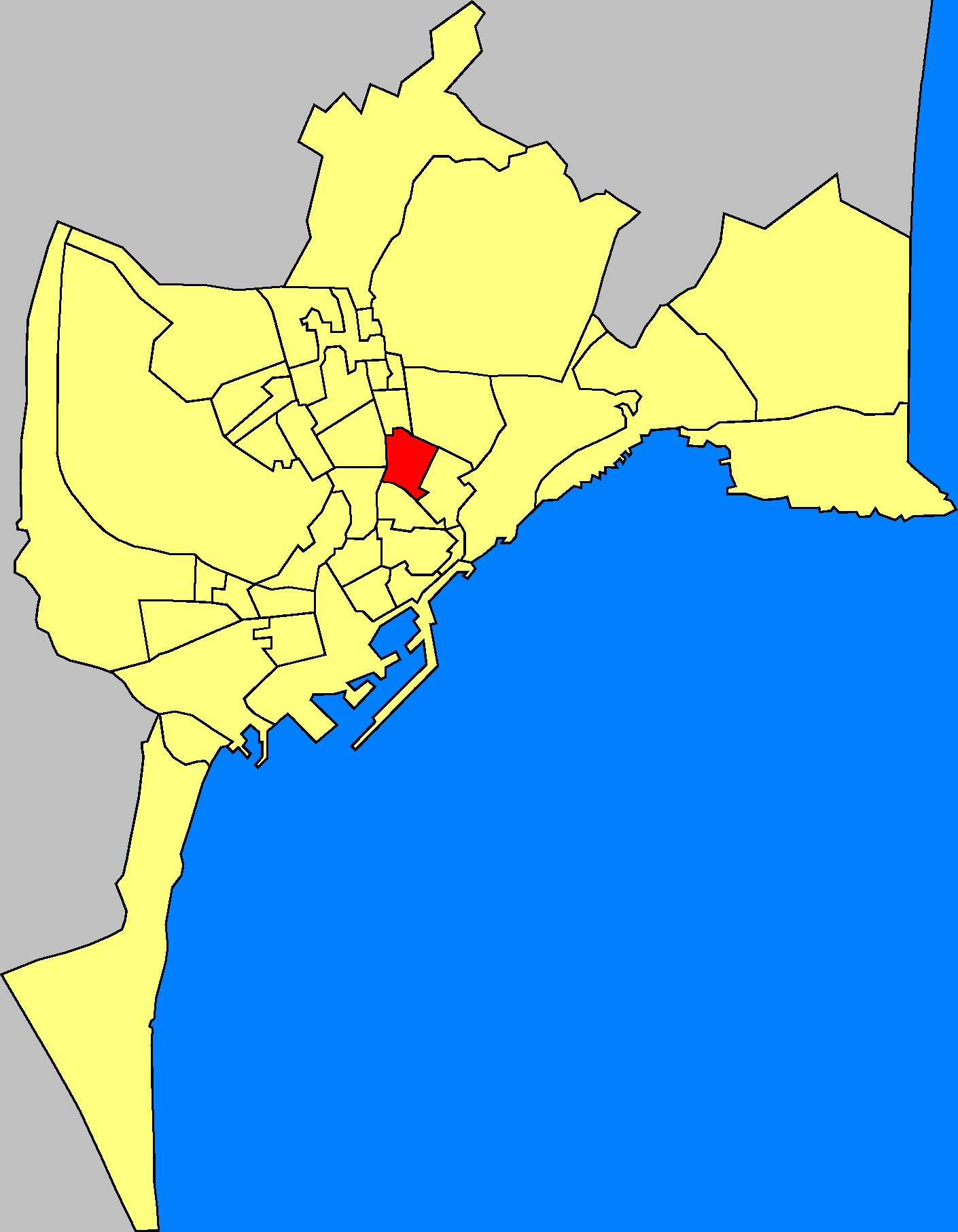 Barrios de la ciudad de Alicante